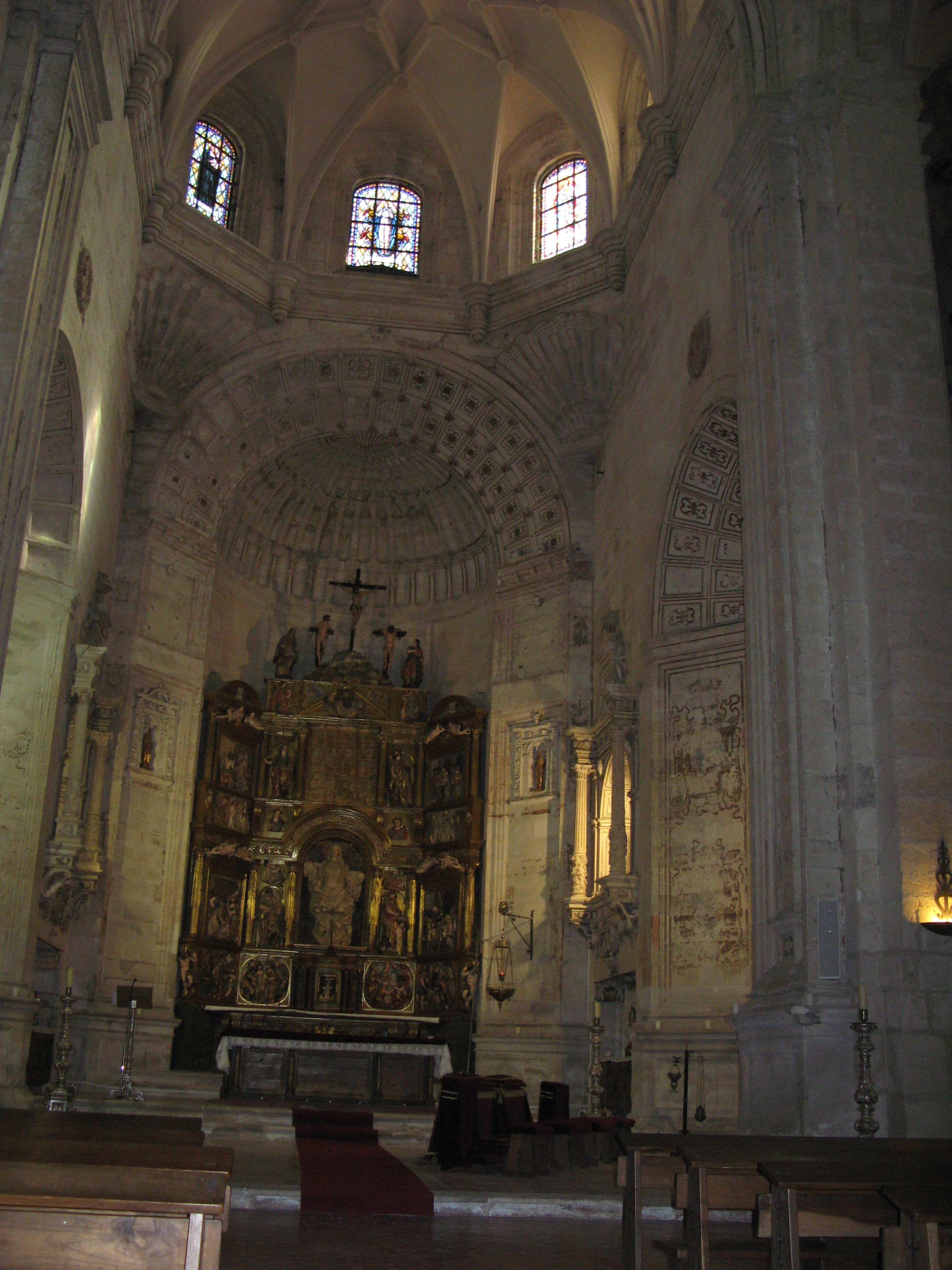 Monassterio de La Santa Espina